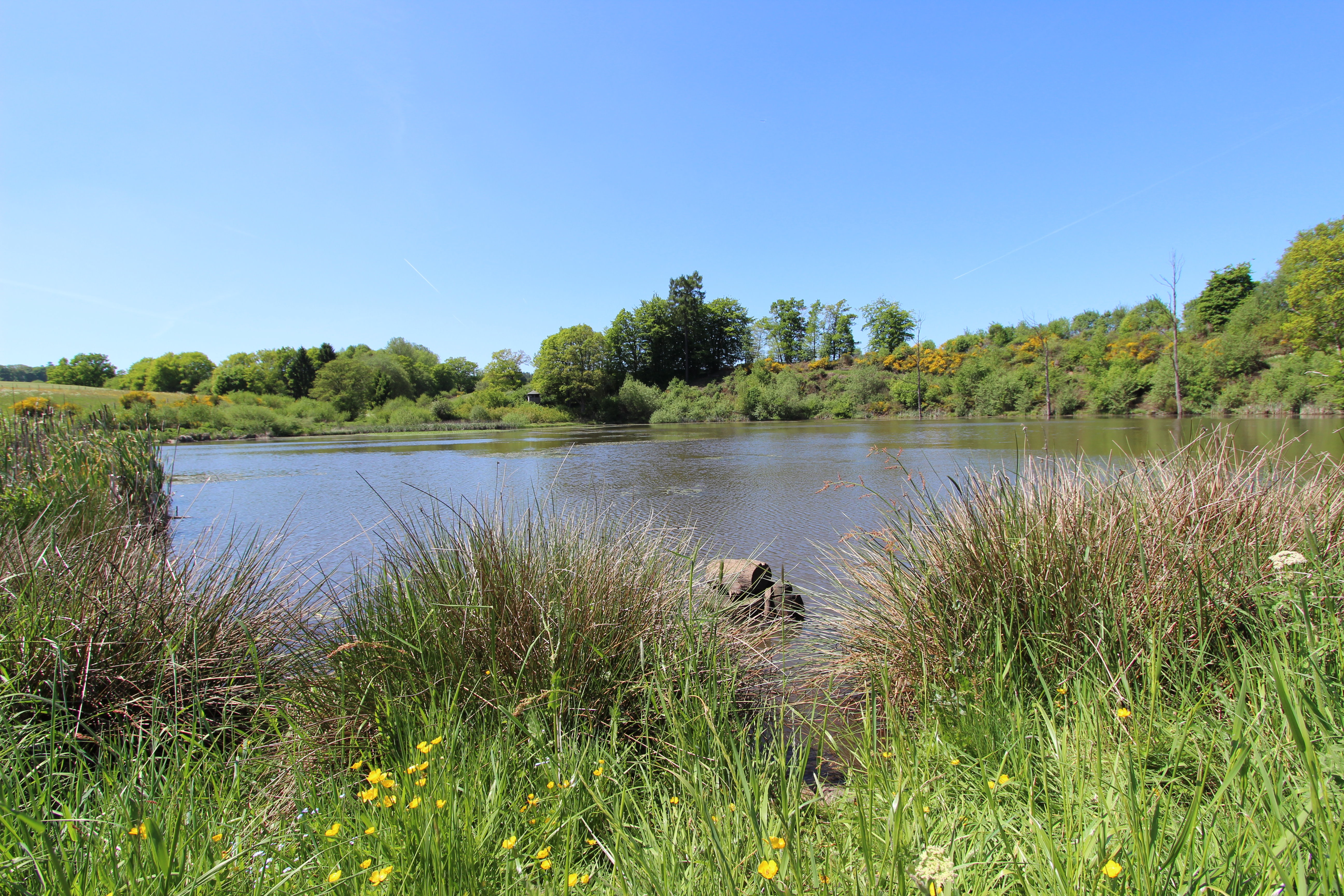 54597 Steffeln; südlich von Steffeln, an der Landstraße 24 zwischen Steffeln und Duppach. Das Eichholzmaar ist eines der kleineren Maare in der Vulkaneifel. Es hat einen Durchmesser von ca. 120 m. Die größte Tiefe liegt bei 3 m. Aufnahme von 2017.